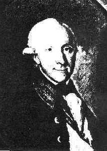 Friedrich Ewald von Fircks (1733-1802), Landrat des Kreises Pilten (Kurland) und Erbherr auf Schloss Hasenpoth